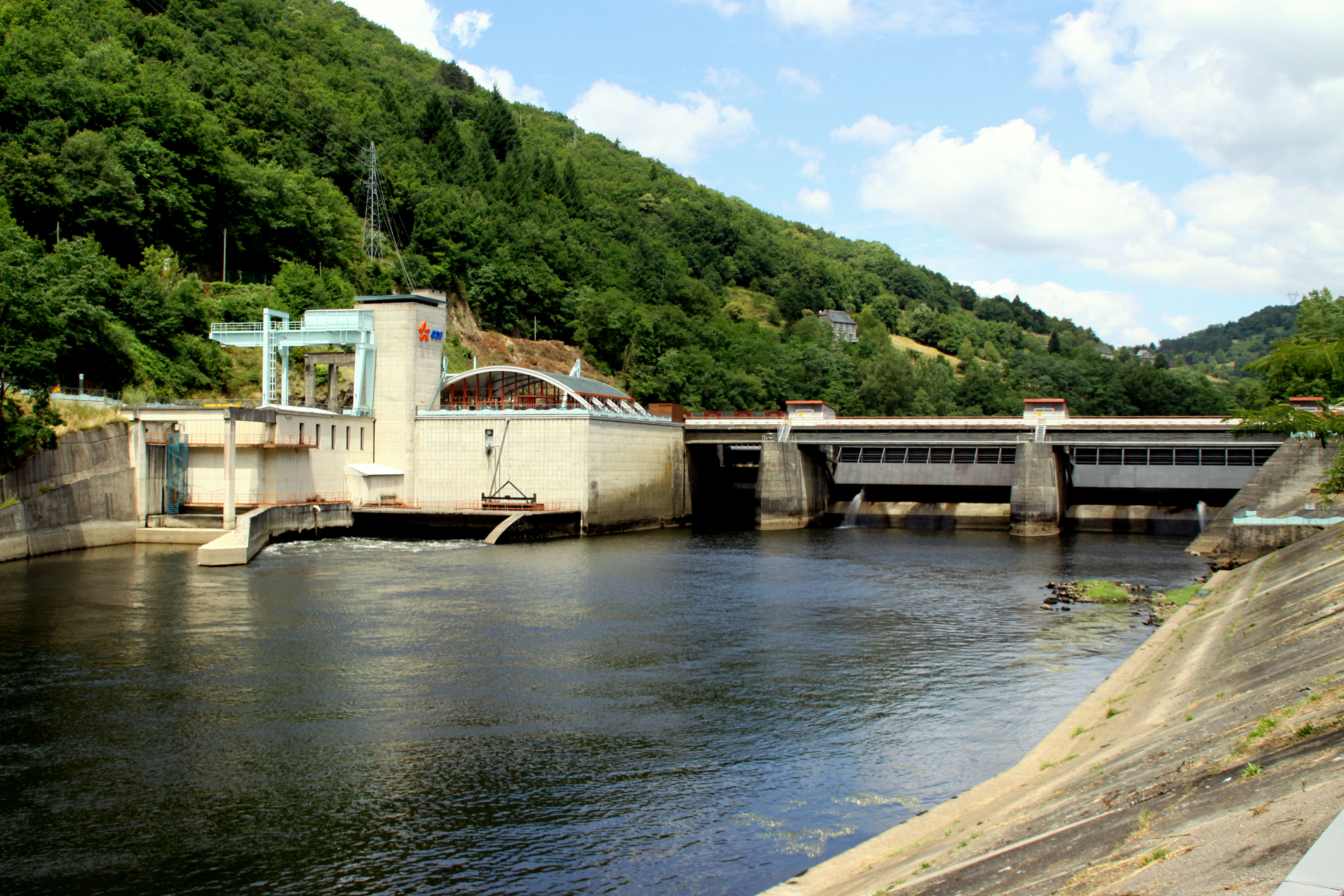 D'Staumauer an d'elektresch Zentral vu Cambeyrac